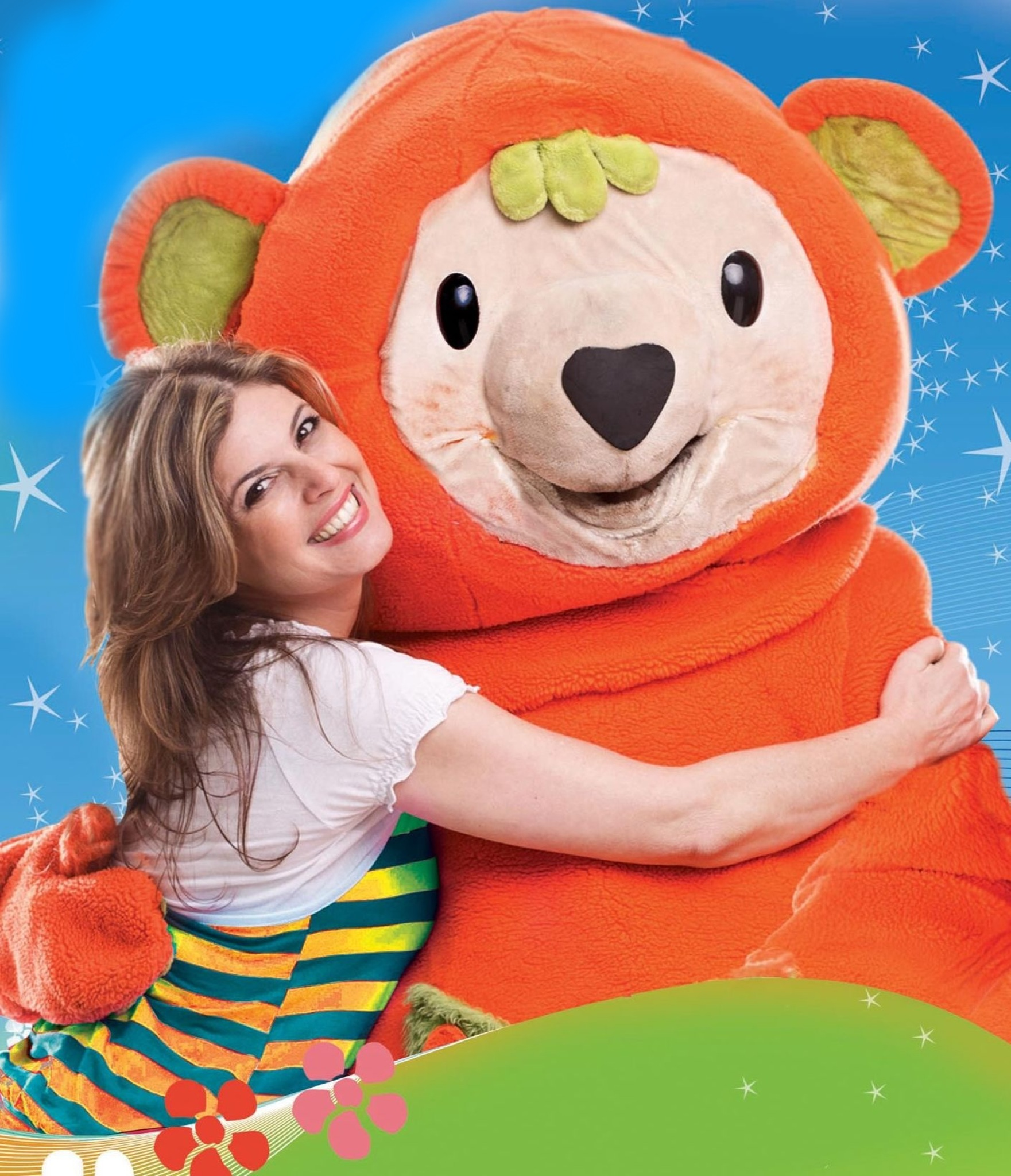 שרון שחל ב" דיגדיגדוג"